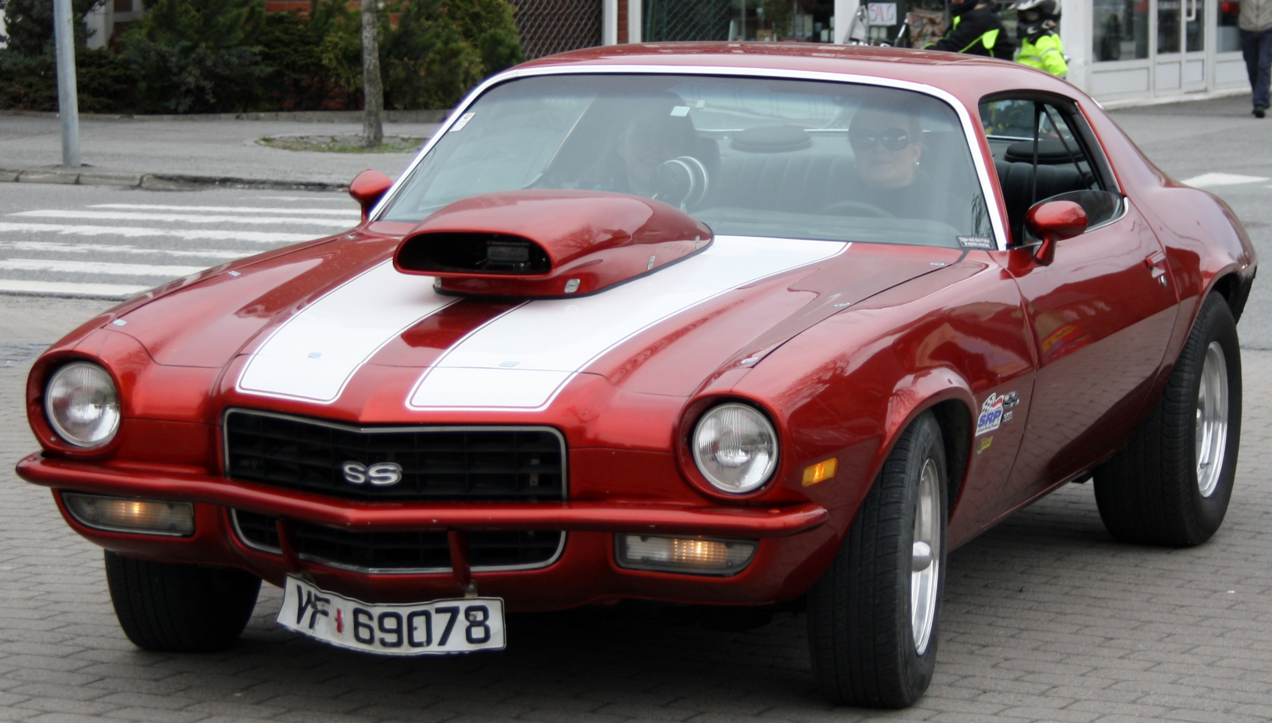 Norskregistrert Chevrolet SS.